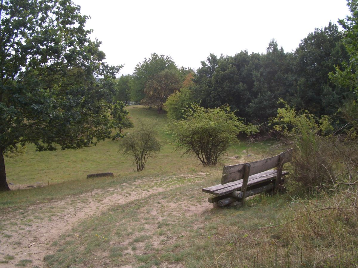 Naturschutzgebiet Hauptmannsberg (Mecklenburg-Vorpommern).